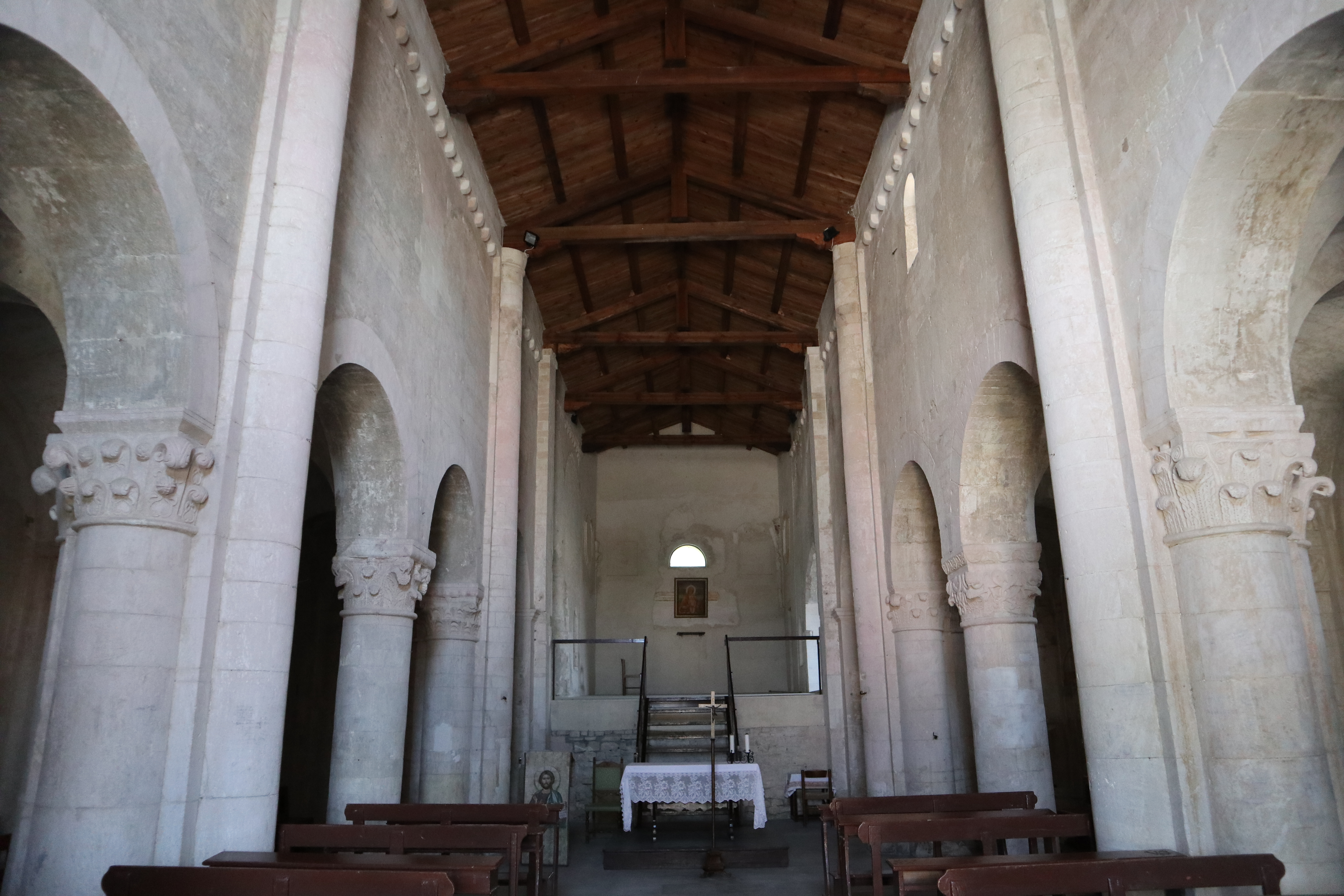 Interno